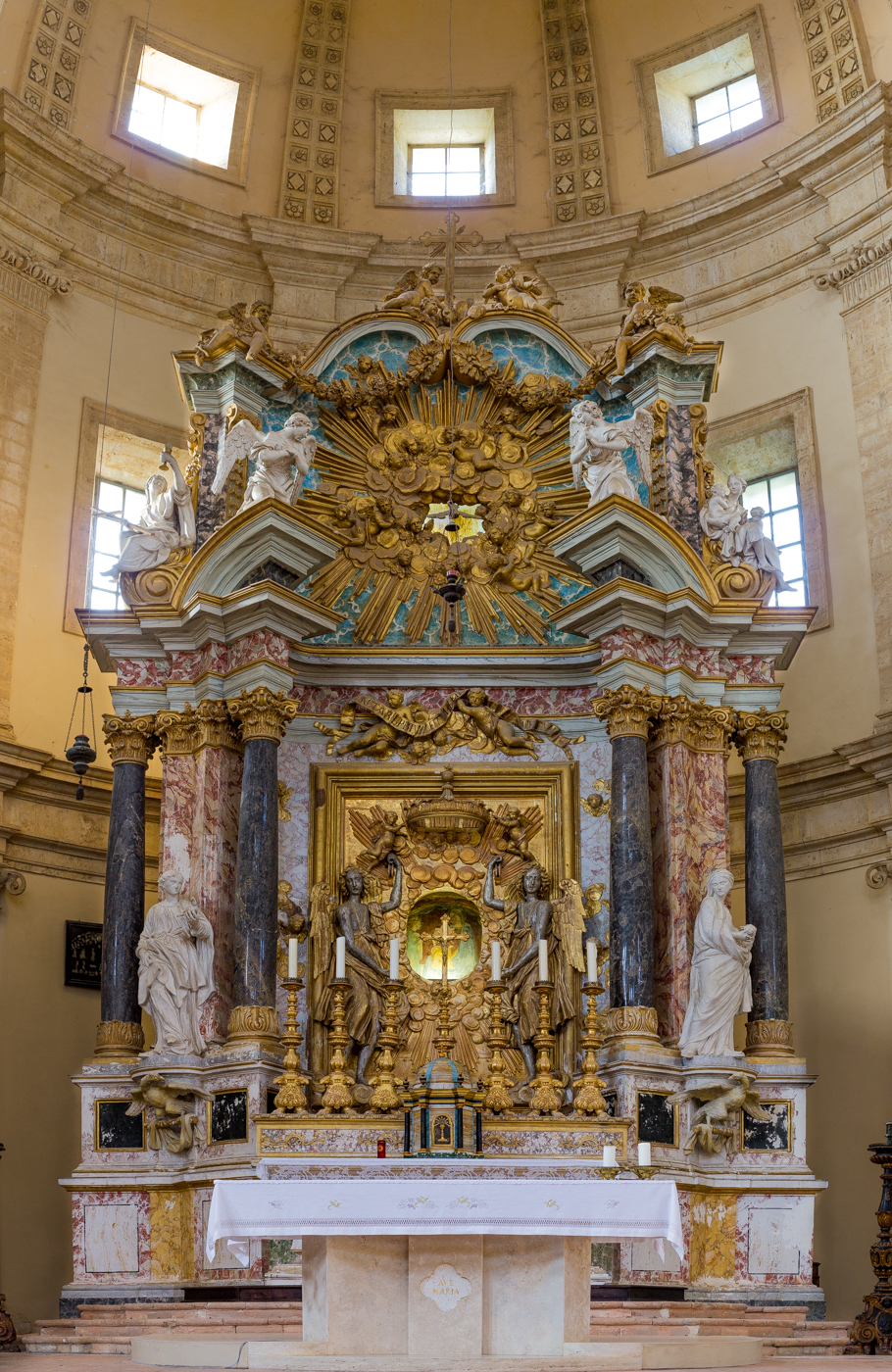 L'altare all'interno del Tempio di Santa Maria della Consolazione This is a photo of a monument which is part of cultural heritage of Italy.